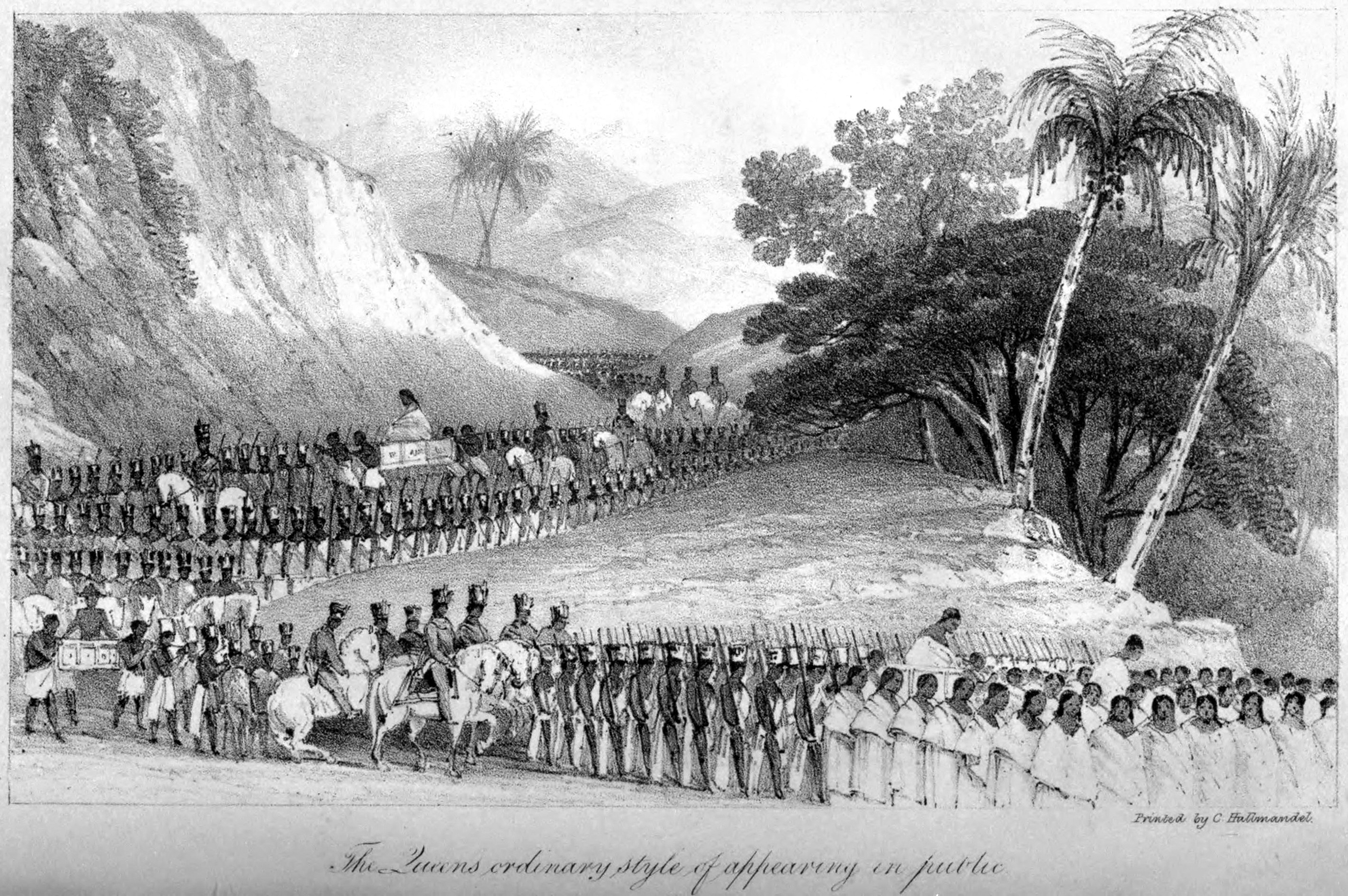 The Queen's Ordinary Style of Appearing in Public